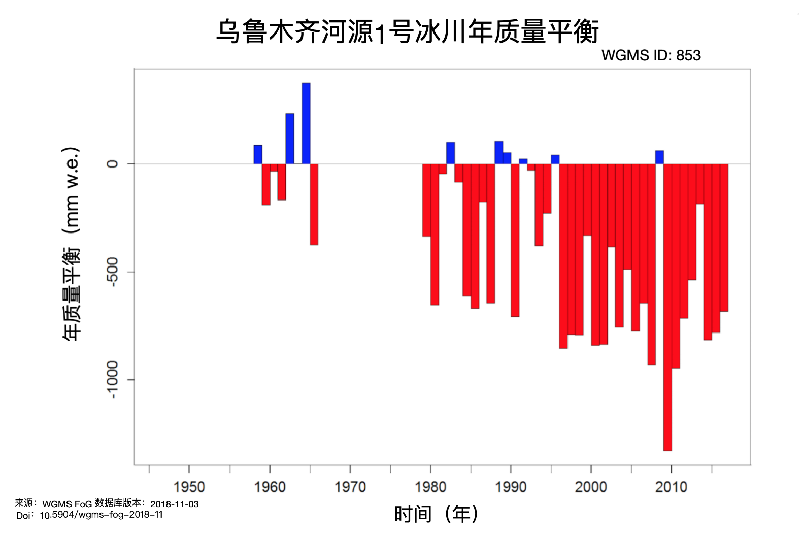 乌鲁木齐河源1号冰川年质量平衡